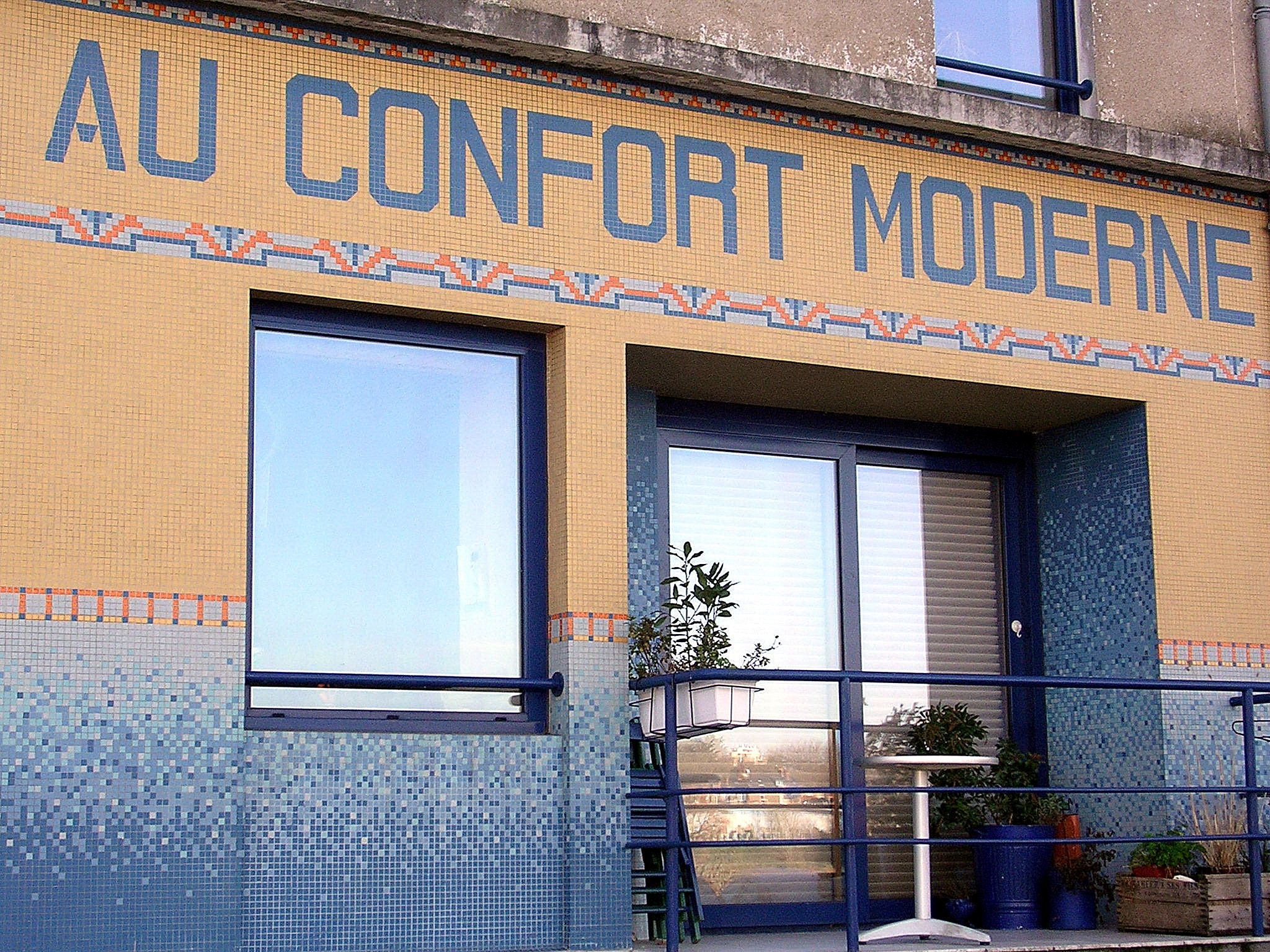 Façade décor du film "La Reine Blanche", à Trentemoult. Photo prise par Jibi44.